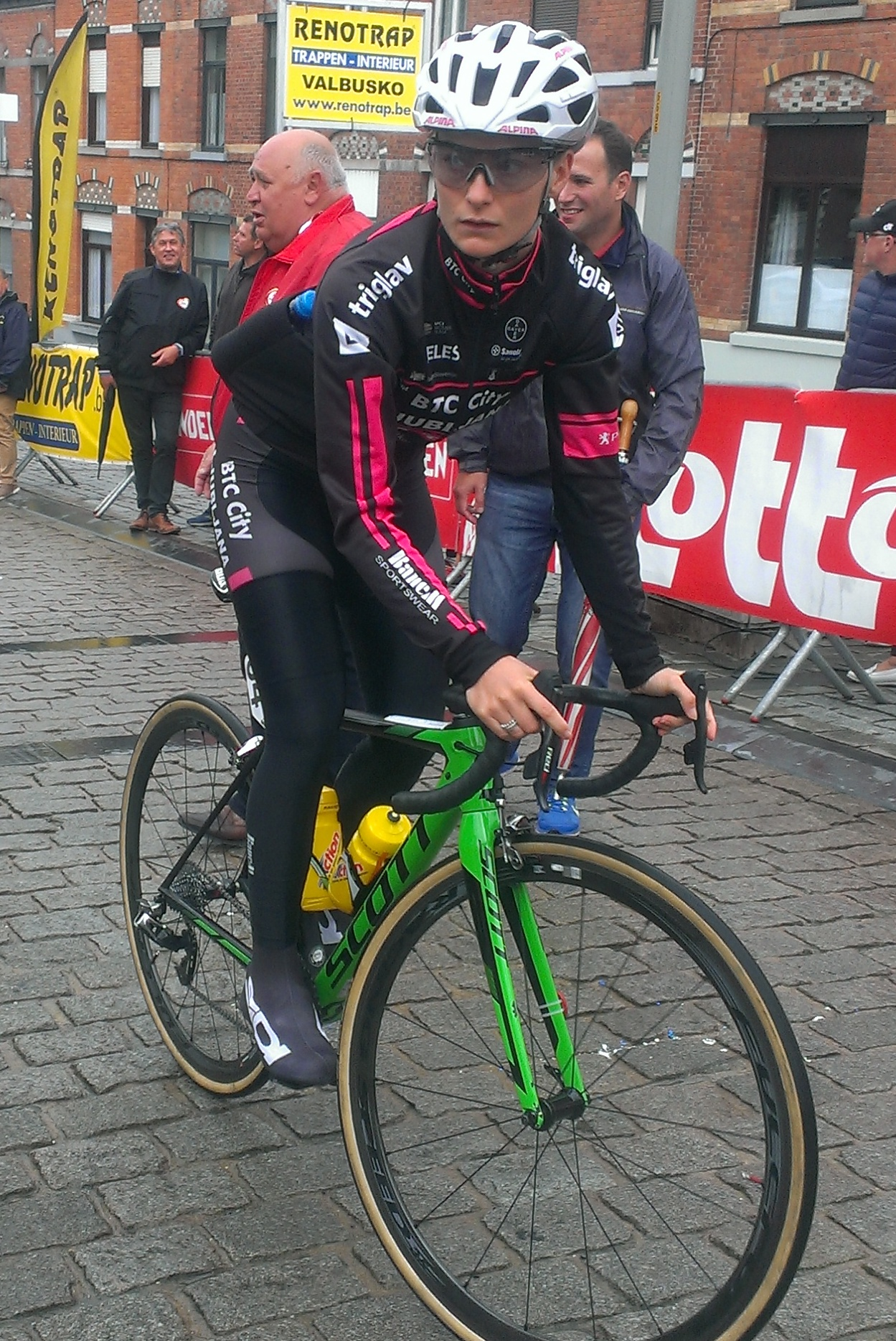 Start van de 3e en laatste etappe van de Lotto Belgium Tour 2017 in Geraardsbergen.